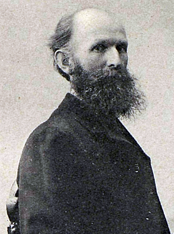 Анатолий Арсеньевич Кузьмин (18 ноября 1859 — после 1912) — земский начальник, председатель уездного съезда, депутат III Государственной думы от Вологодской губернии (1907—1912).